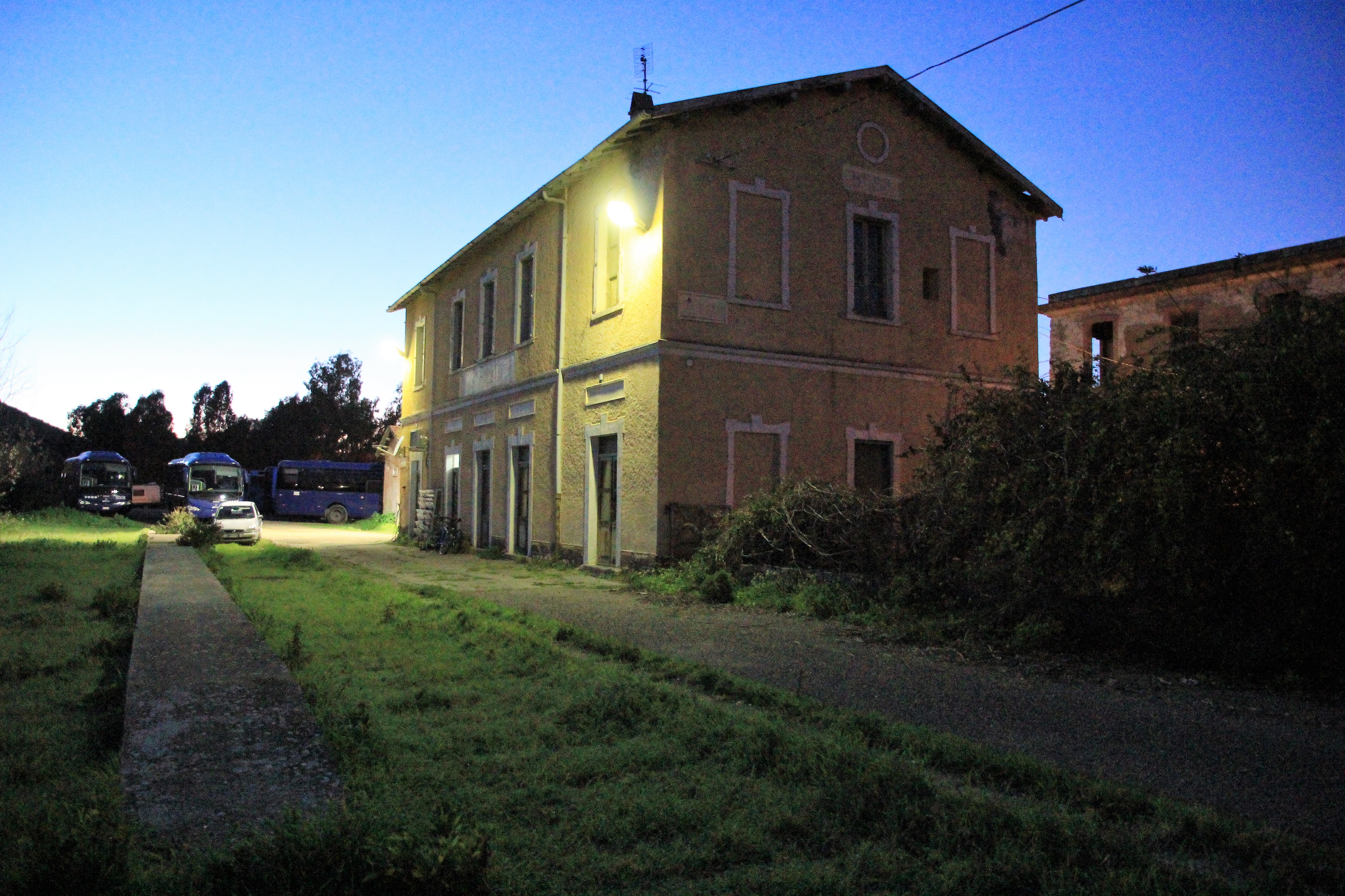 Bosa, stazione ferroviaria